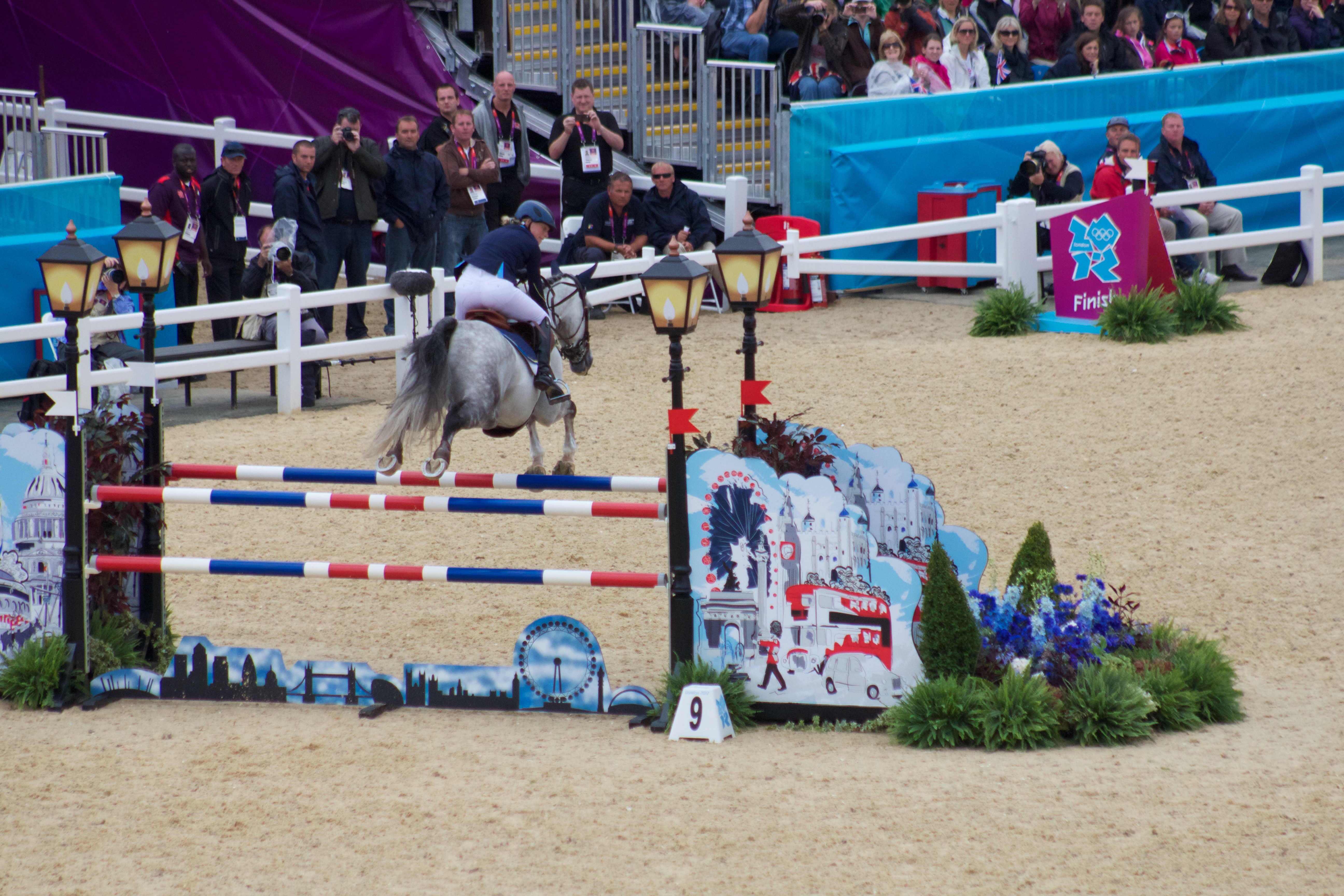 Sara Algotsson-Ostholt och Wega över det sista hindret under den indivudella finalomgången av banhoppningen under fälttävlan vid olympiska sommarspelen 2012.